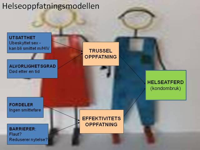 Helseoppfatningsmodellen